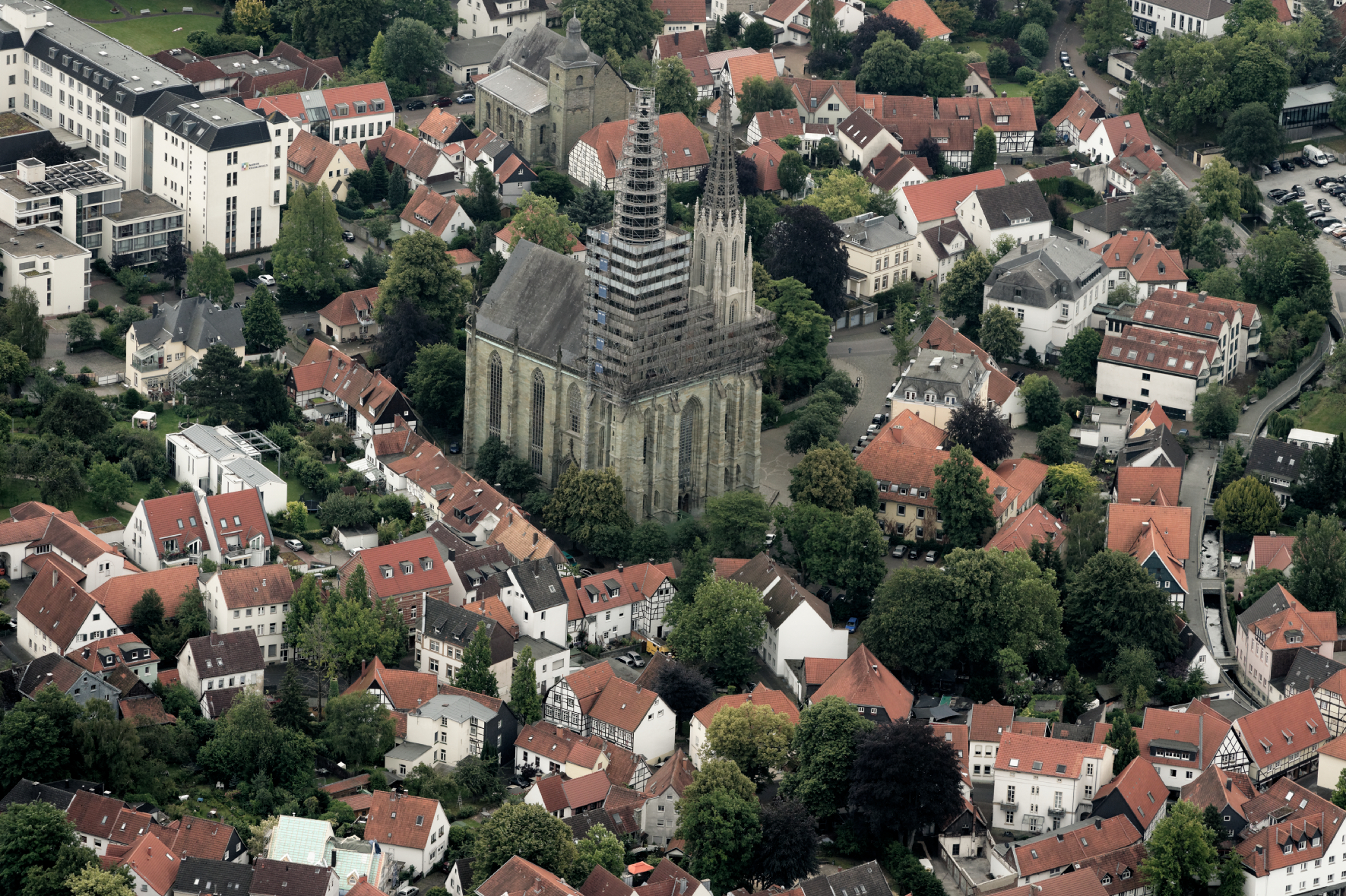 Fotoflug Sauerland Nord. Soest: Wiesenkirche und St. Maria zur Höhe. The making of this document was supported by the Community-Budget of Wikimedia Germany.